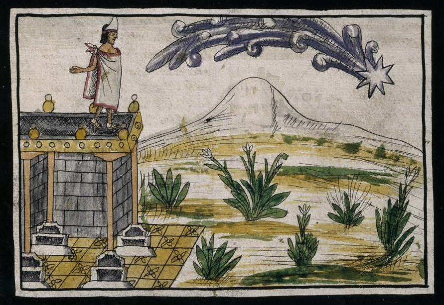 Diego Durán, Historia_de_las_Indias_de_Nueva_España_e_islas_de_la_tierra_firme (Codex Duran) f._182r: Montezuma II observes a comet